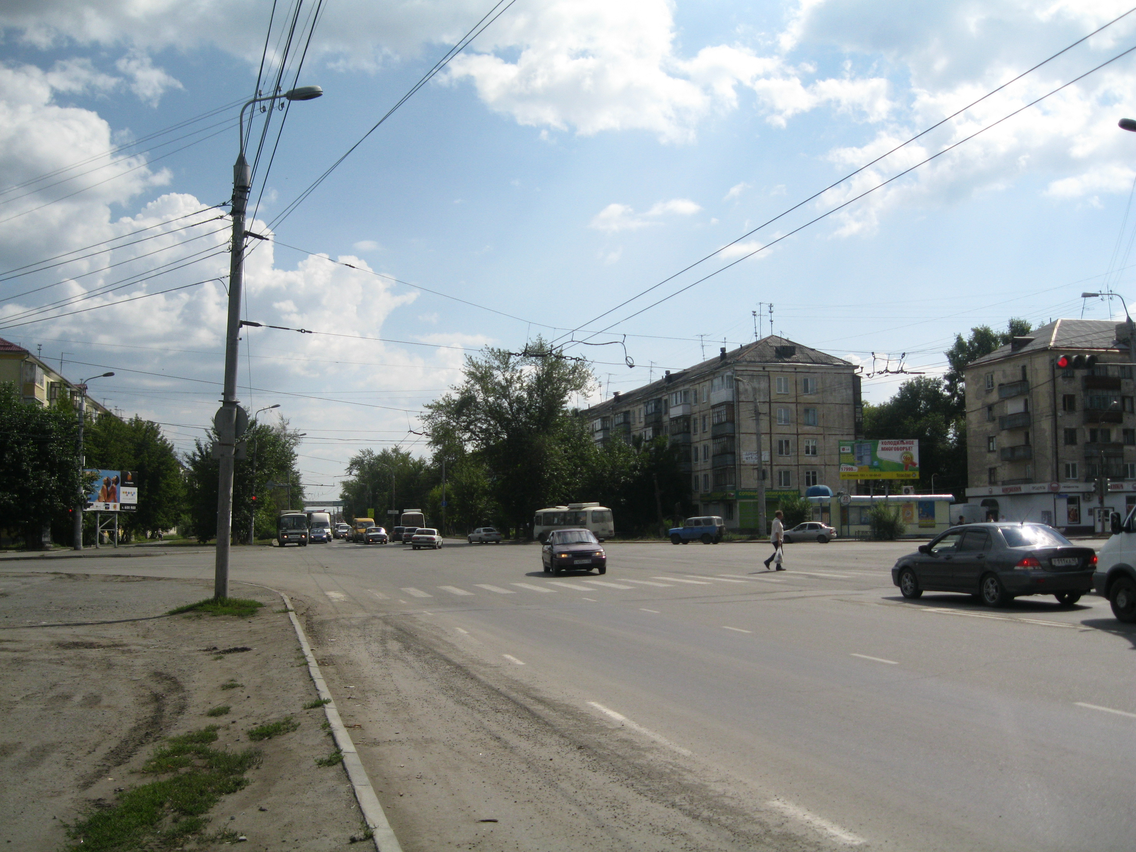 Перекрёсток проспекта Машиностроителей и улицы Дзержинского в Кургане, Россия